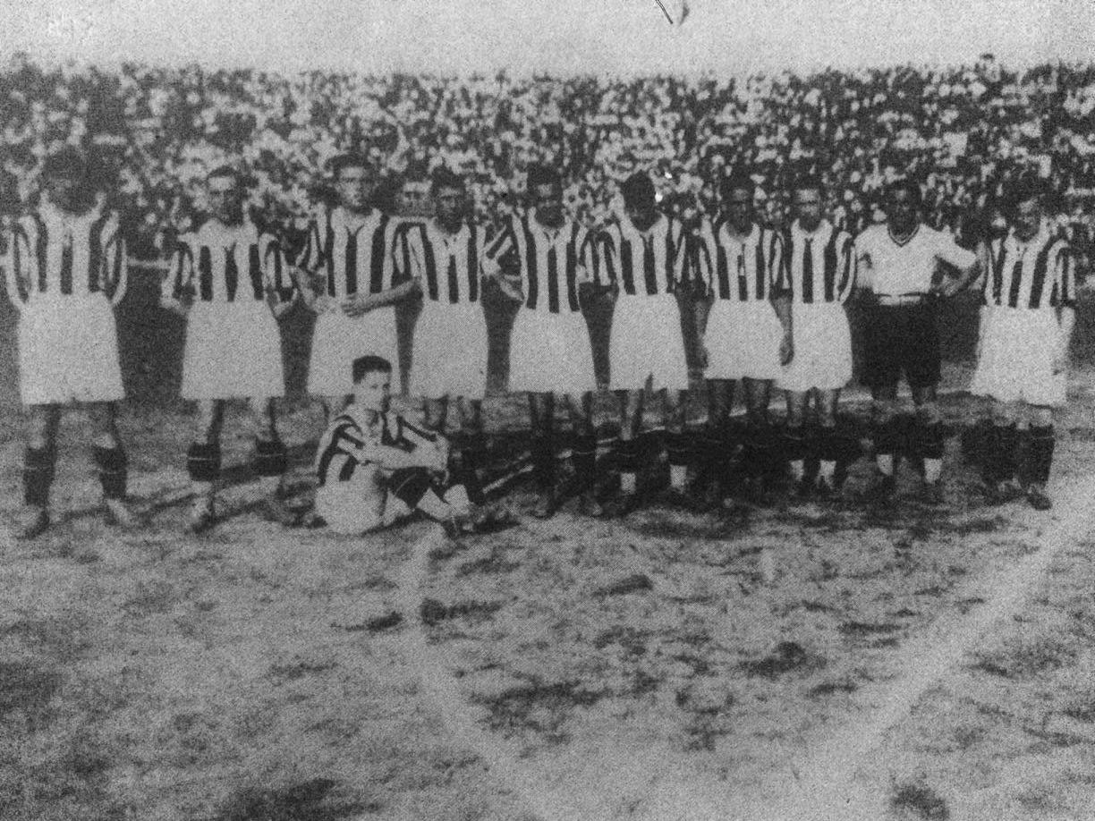 Una formazione della Juventus nella stagione 1928-29. Da sinistra, in piedi: C. Bigatto (I) (capitano), O. Barale, G. Borgo (I), E. Borgo (II), G. Galluzzi, A. Vojak (I), F. Munerati, V. Rosetta, G. Combi, L. Cevenini (III); accosciato: M. Ferrero.